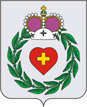 Герб Боровского района Калужской области